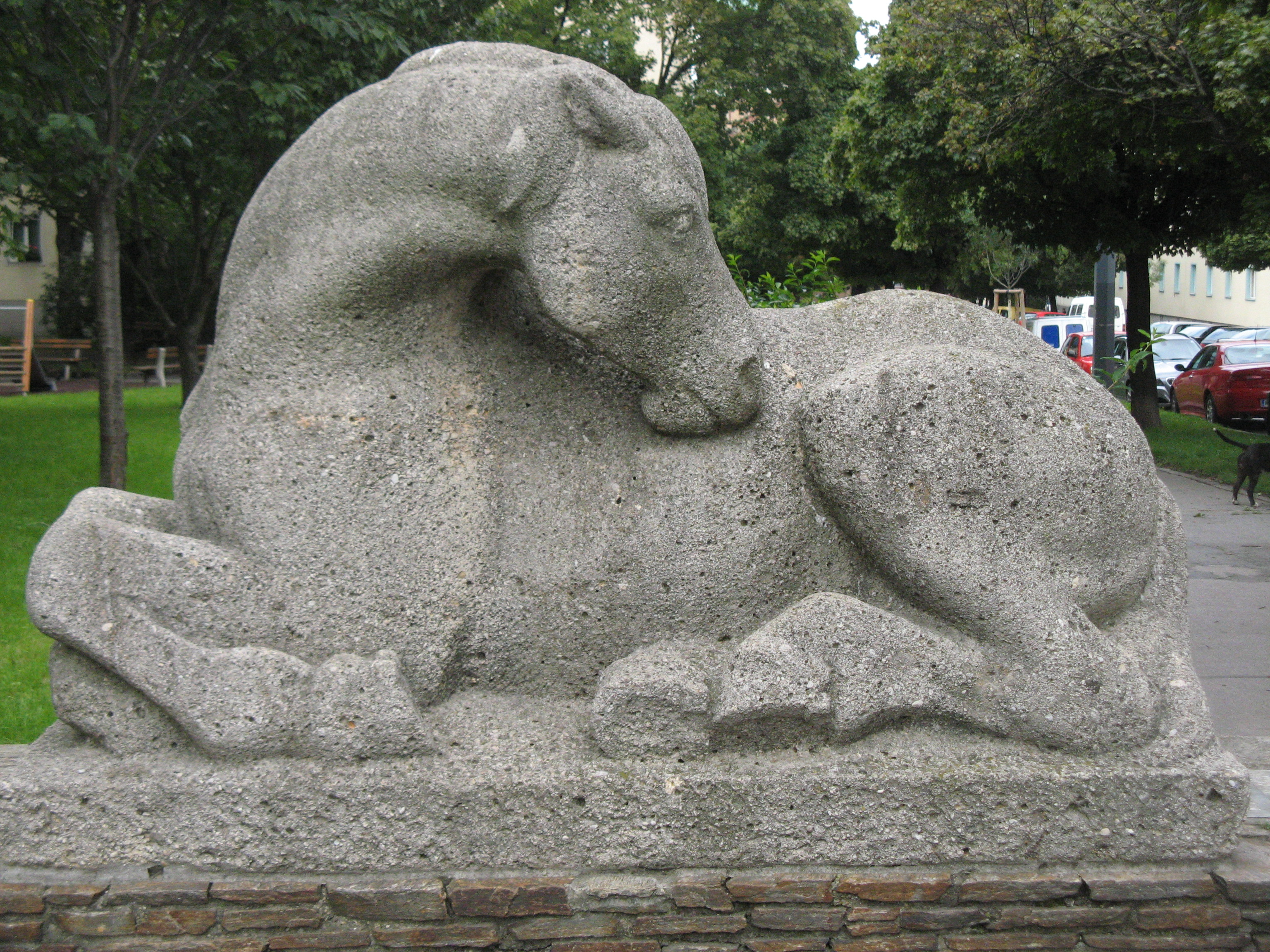 Liegendes Pferd (1958), Natursteinplastik von Robert Ullmann, Troststraße 18, Wien-Favoriten